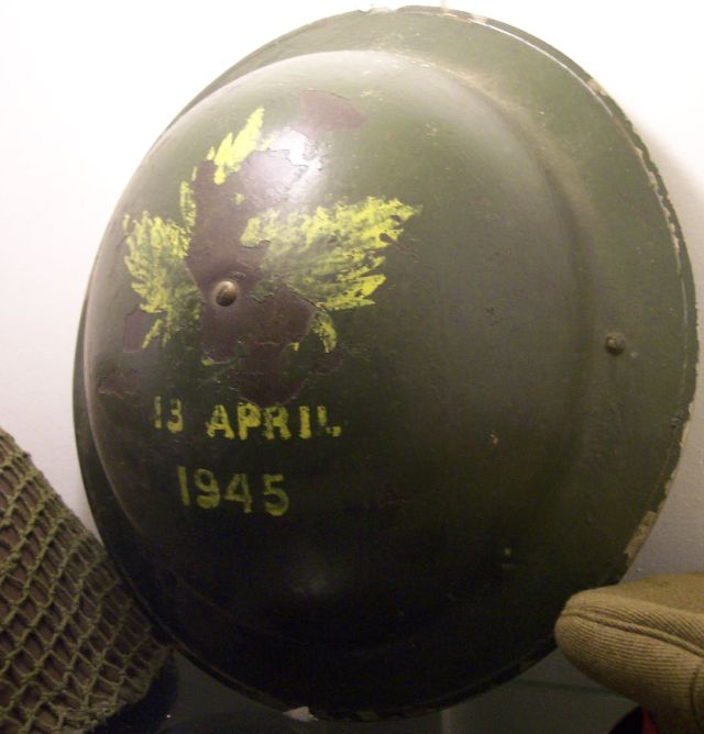 Mk II, Canadian WWII helmet